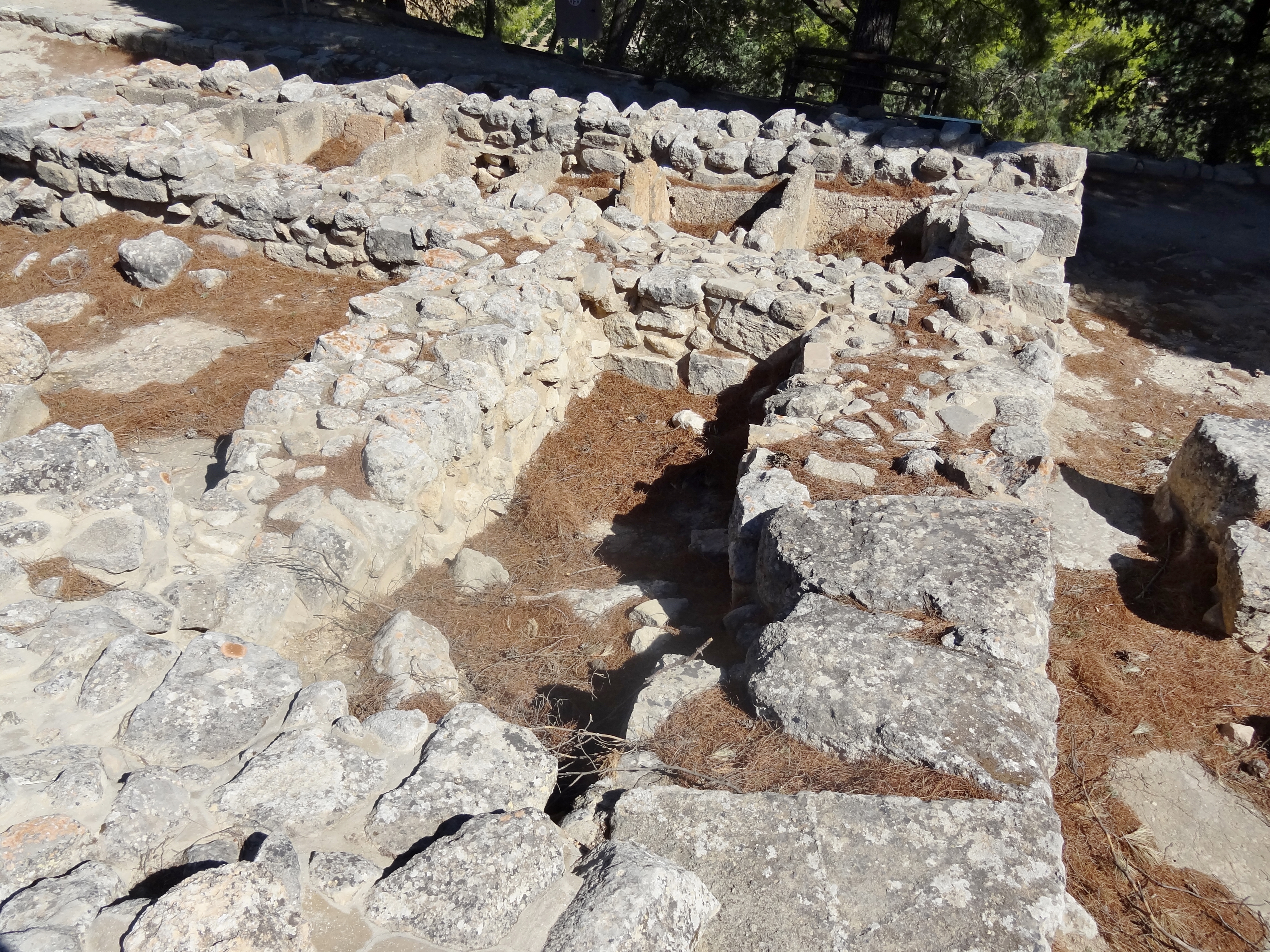 Palast von Phaistos (Φαιστός), Gemeinde Festos, Regionalbezirk Iraklio, Kreta, Griechenland